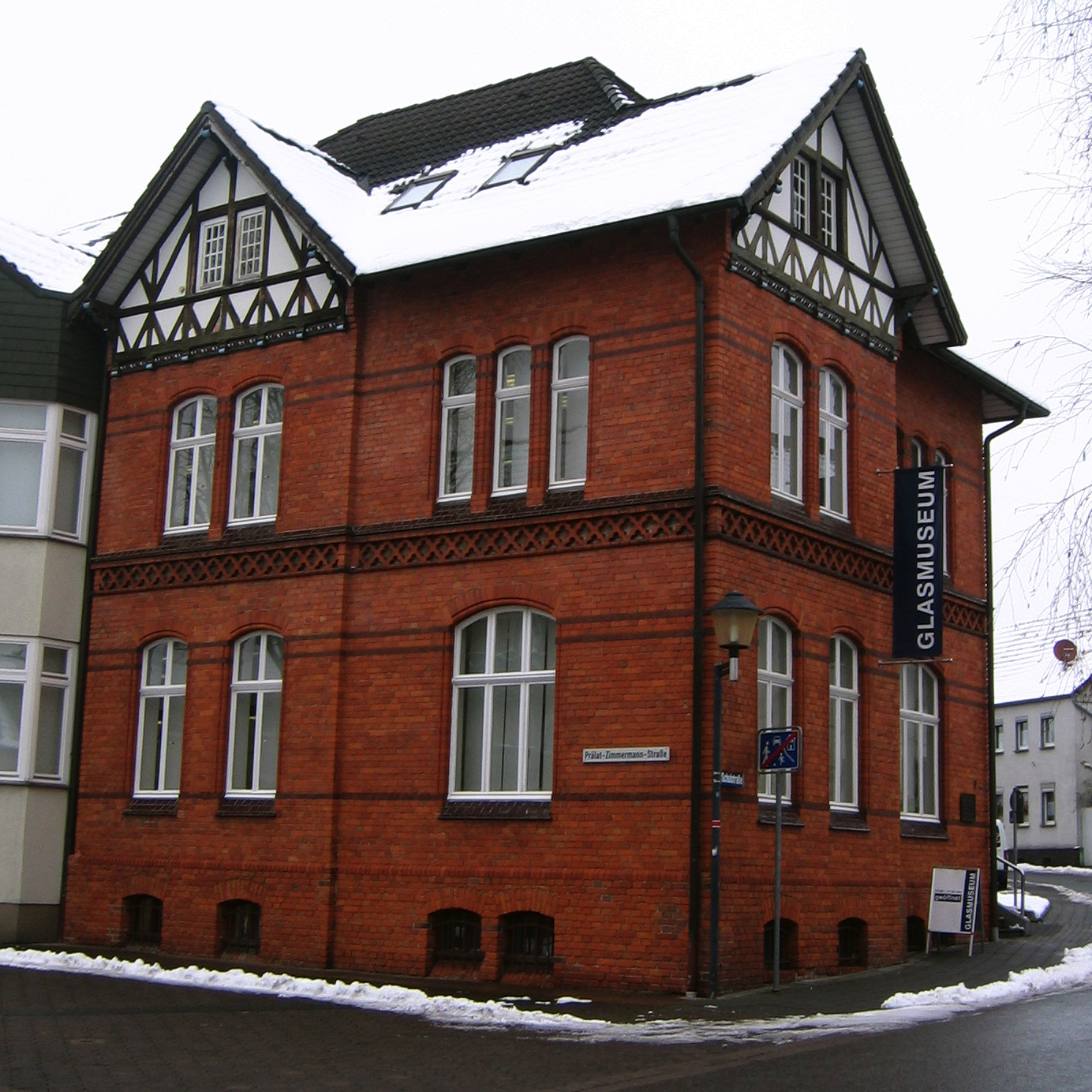 Das Heinz-Koch-Haus mit dem Glasmuseum in der Schulstr. 7, Bad Driburg, Deutschland.